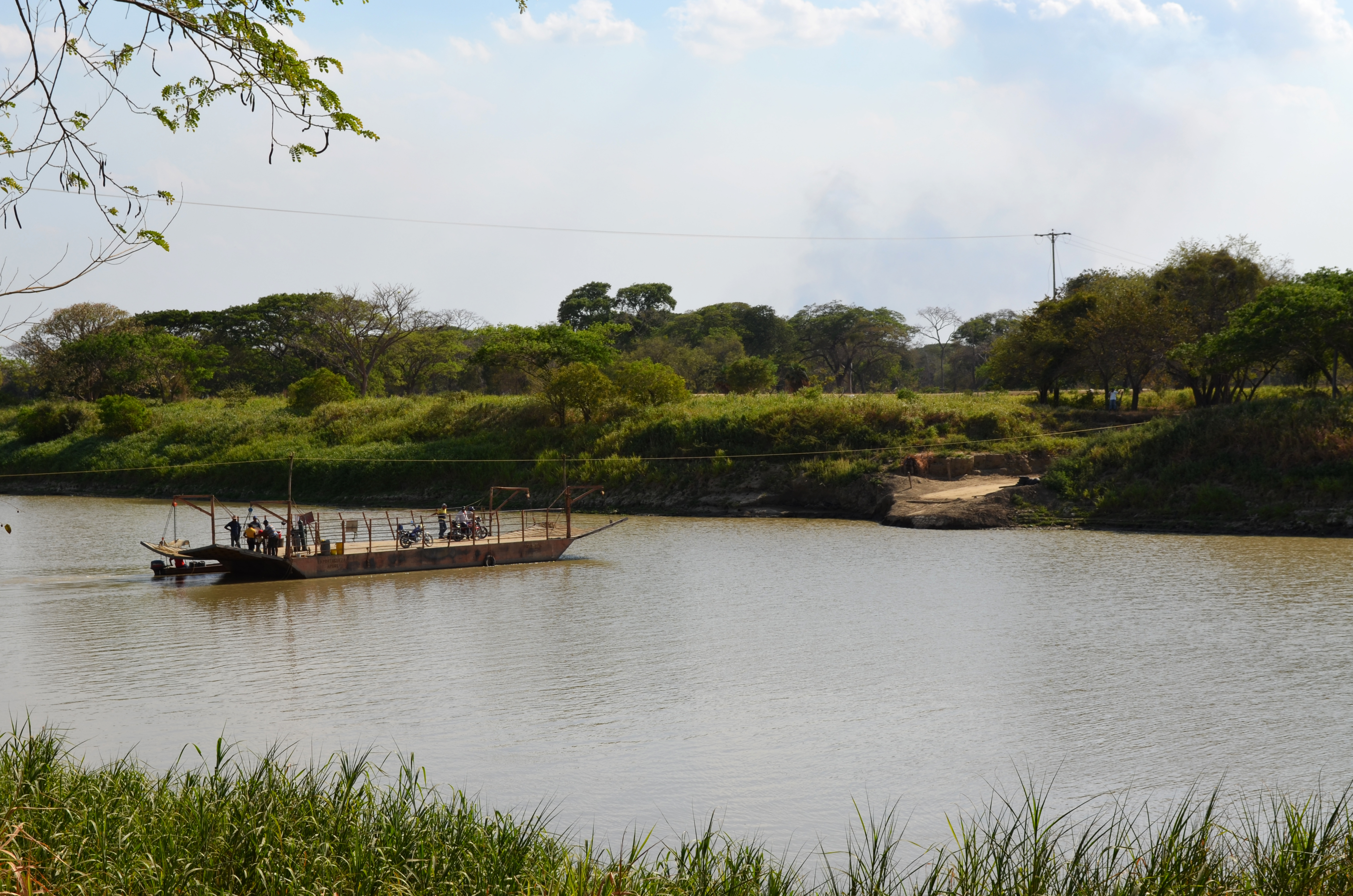 Las chalanas son embarcaciones que se utilizan para el transporte de personas y vehículos en caso de que exista una corriente de agua sin la presencia de un puente. Chalana que funciona en el Río Portuguesa entre los límites de Guárico y Barinas.